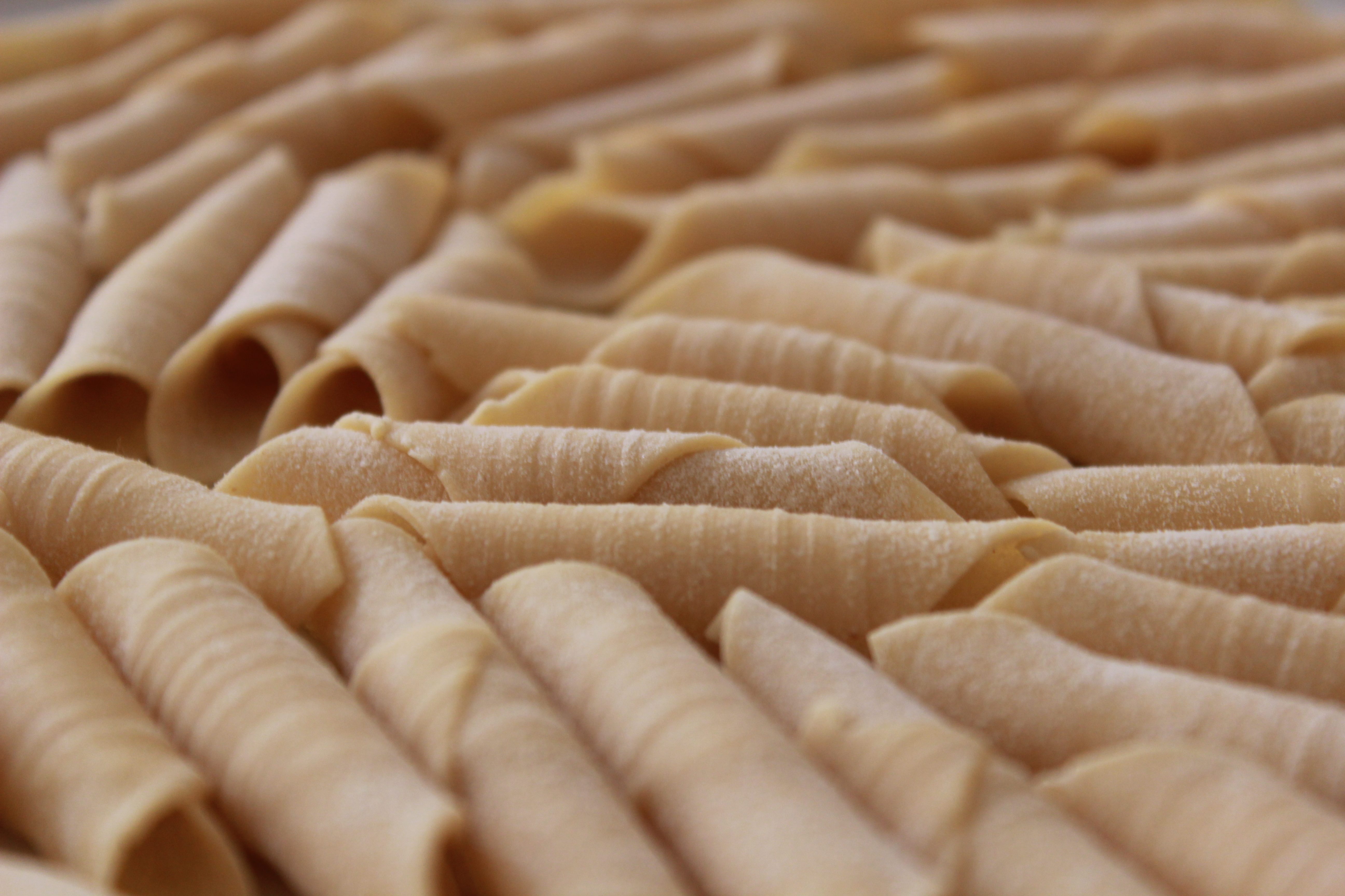 Garganelli em quantidade, feito a mão.